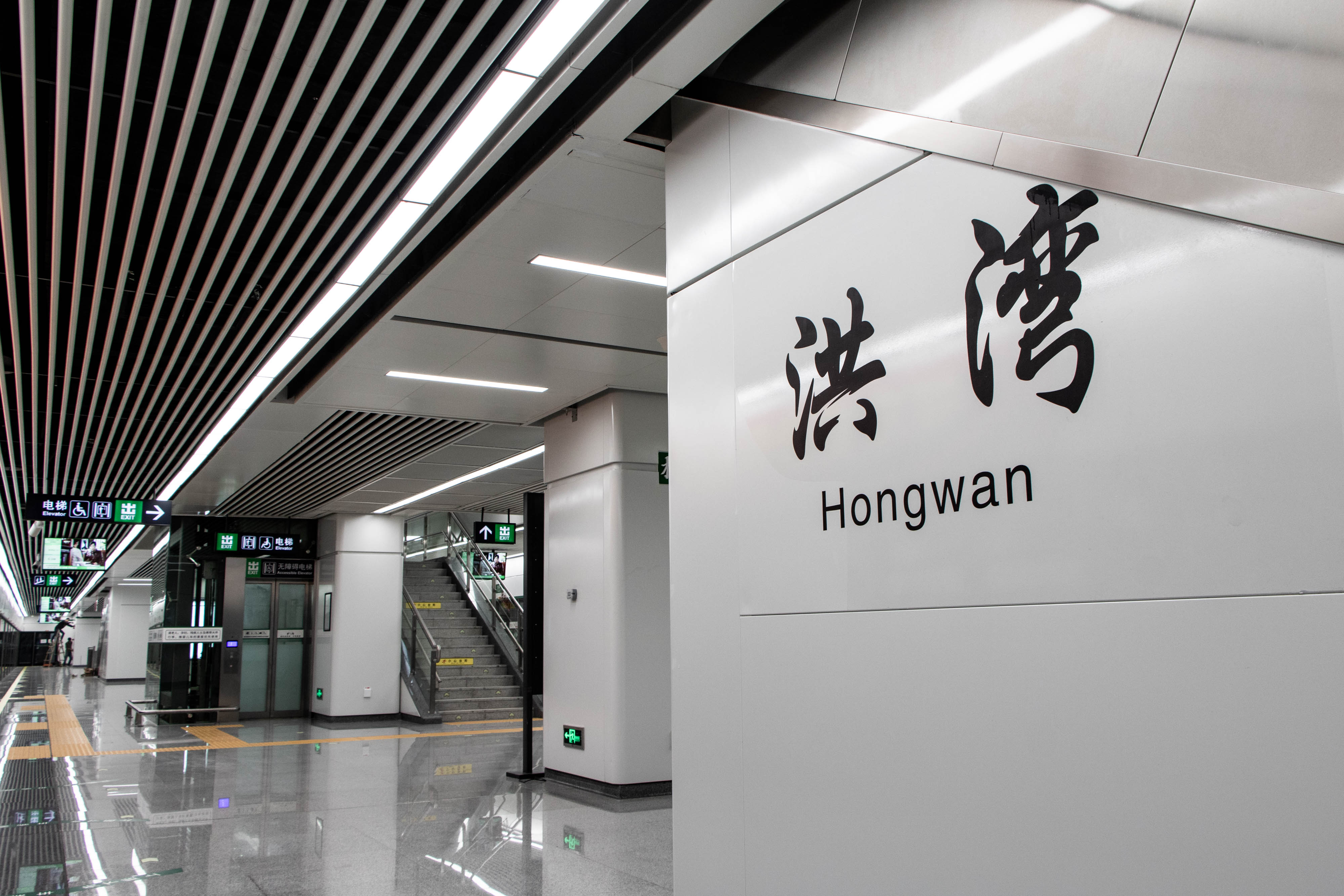 中文（中国大陆）: 洪湾站站台与站名壁